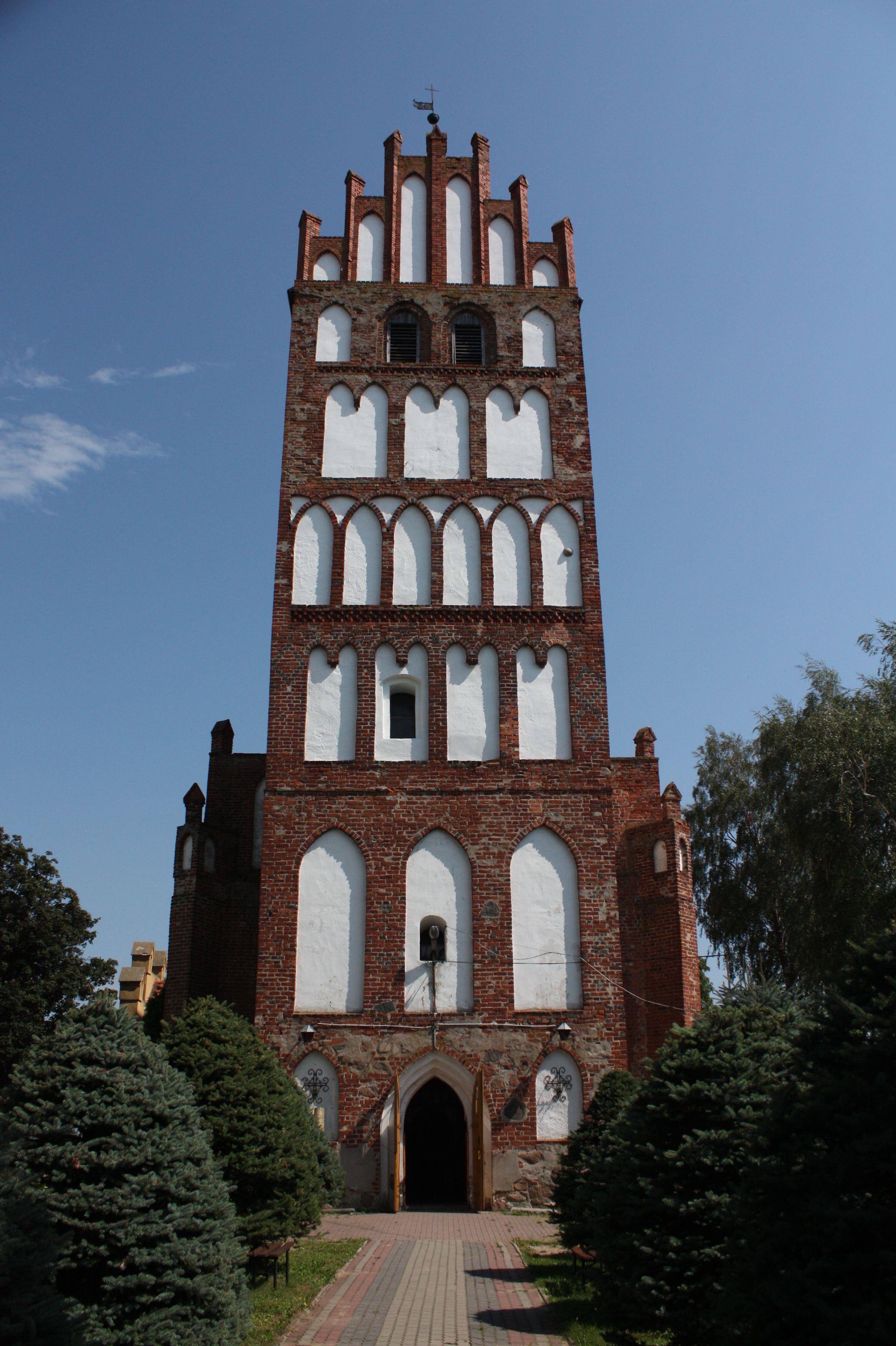 Kiwity 38 - rzymskokatolicki kościół p.w. Apostołów Piotra i Pawła wraz z cmentarzem przykościelnym}, 1350-1370, XV You can see all photographs in category Wikiekspedycja 2012. The making of this document was supported by Wikimedia Polska.